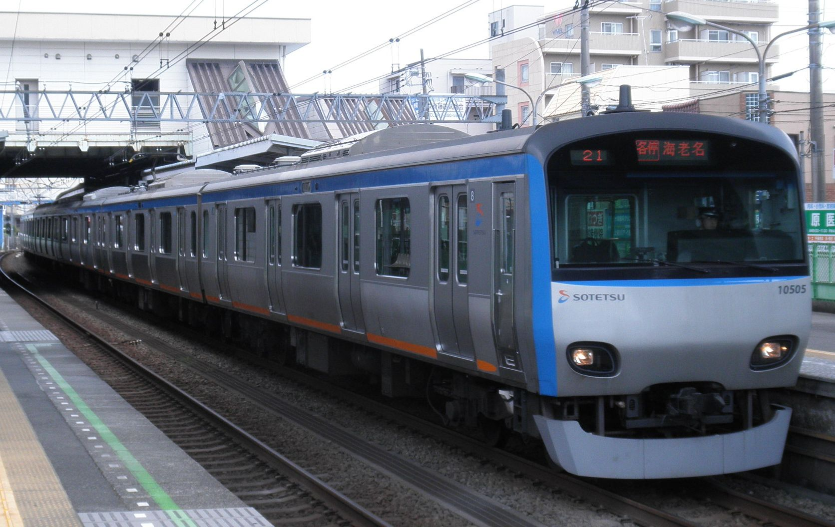 かつて早朝・深夜時間帯のみの運行だった海老名駅発着の各駅停車であったが、2014年4月27日のダイヤ改正から日中時間帯にも運航されるようになっている。